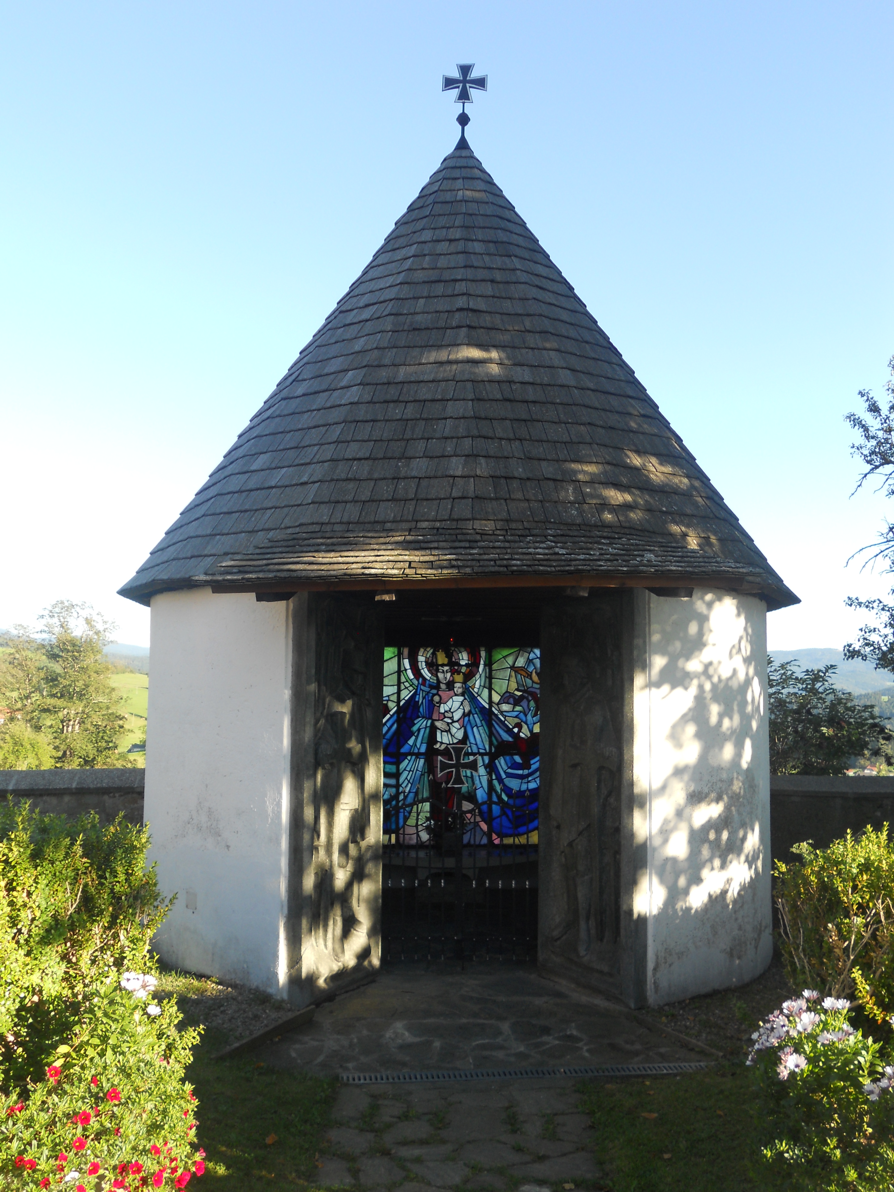 Kriegerdenkmal bei der Wehrkirche Mariahof